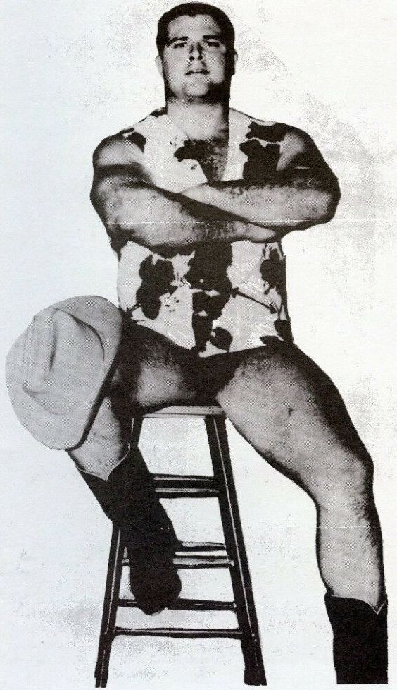 Cowboy Bill Watts avec Gene Kiniski en couverture du magazine de catch Wrestling News de septembre 1968.